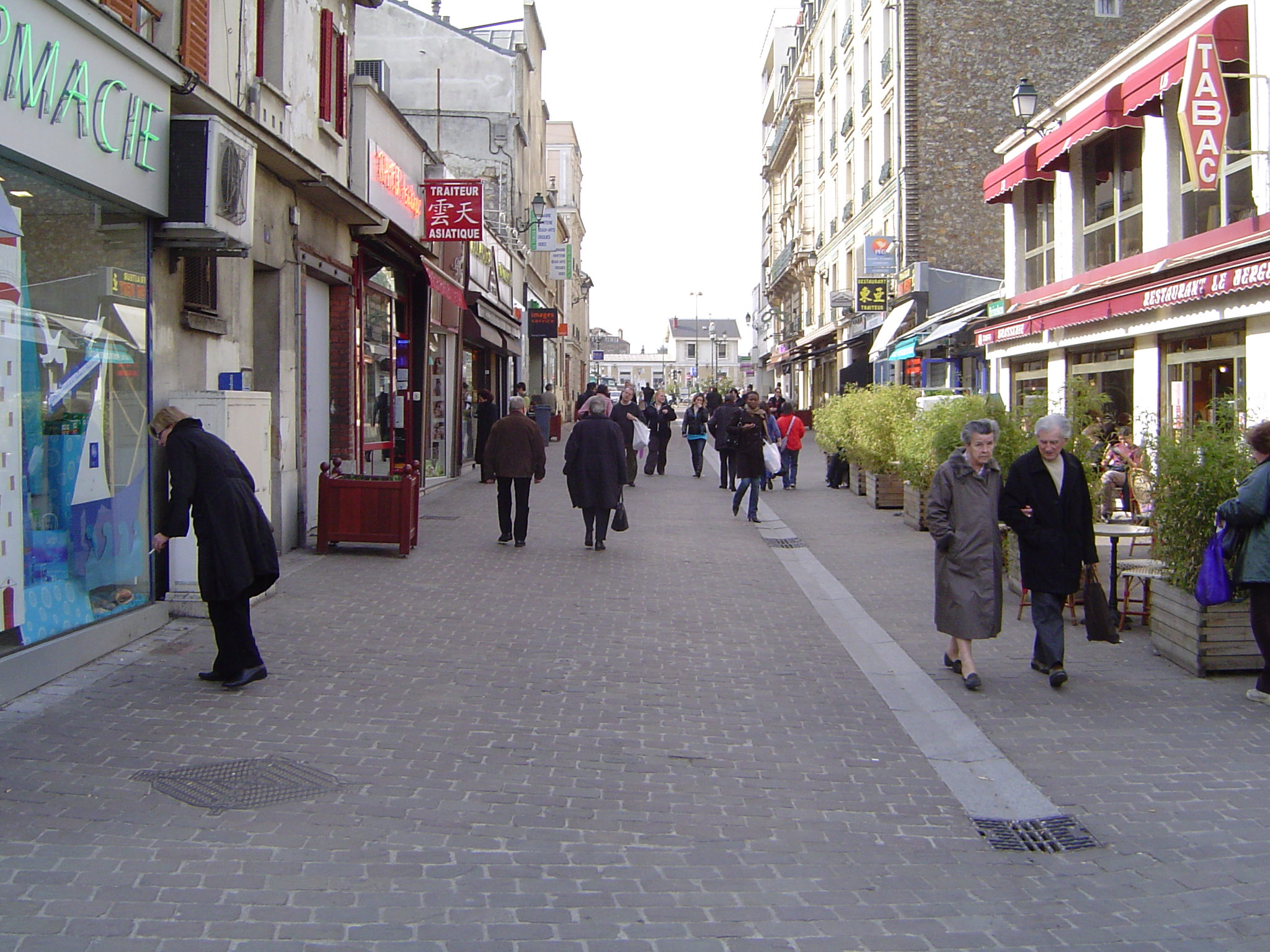 Photos prises à Bourg-la-Reine, commune française des Hauts-de-Seine